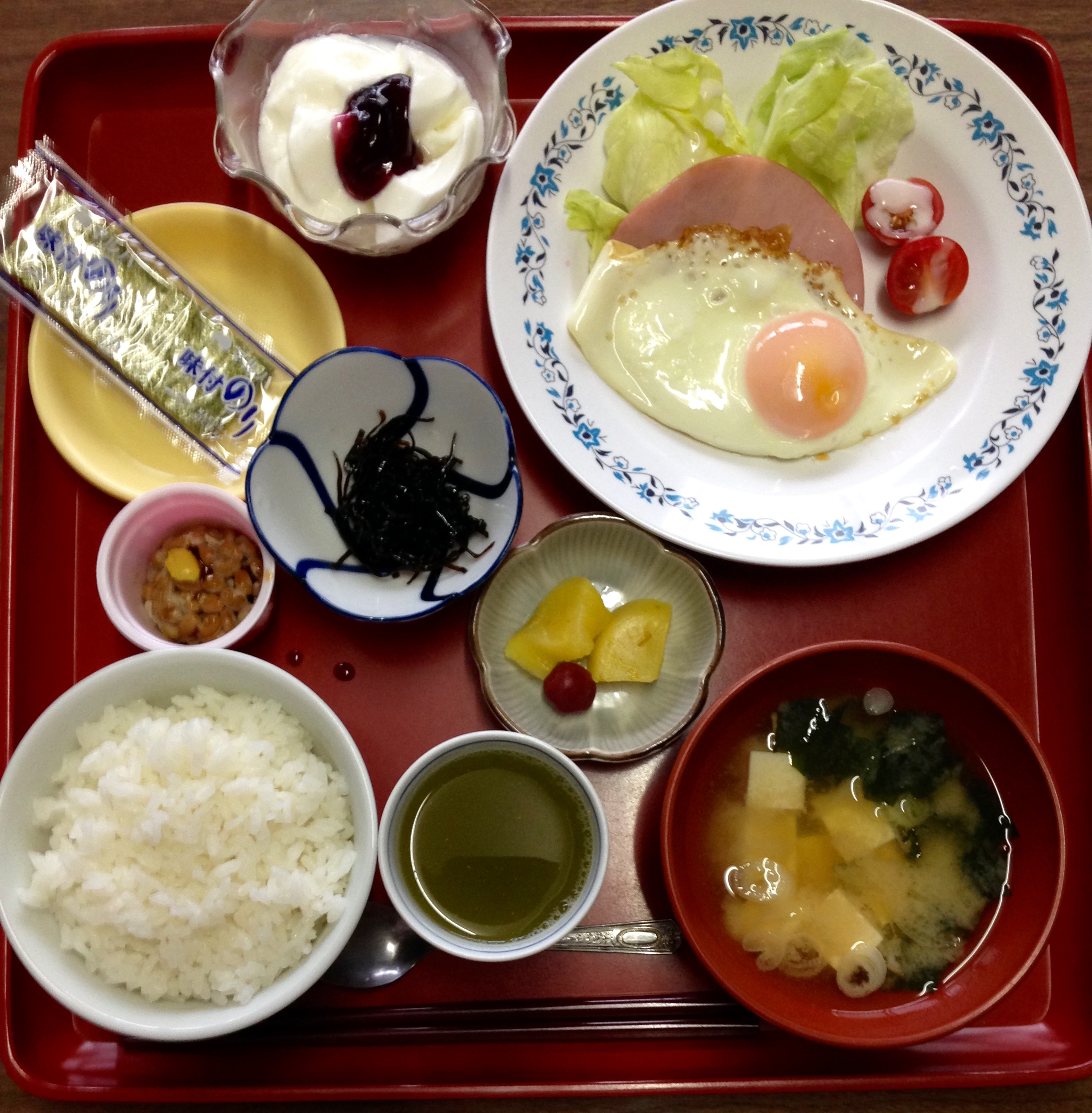 石和温泉ユースホステルに泊まった時の私の朝食です。外部に公開する事はペアレントさんの許可を取りました。